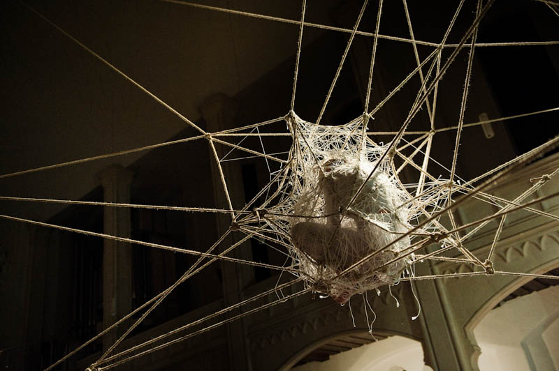 long durational performance im Rahmen einer Veranstaltung Kunst und Kirche, St Lukas Kirche München; Das Einspinnen in einen Cocoon dauerte 9 Stunden; Künstlerin Dorothea Seror.